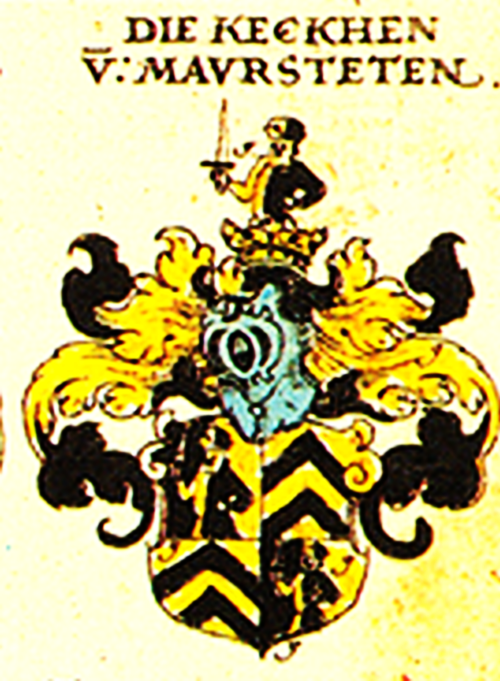 Wappen der Keckh von Mayerstetten, Siebmacher 1605:95,5